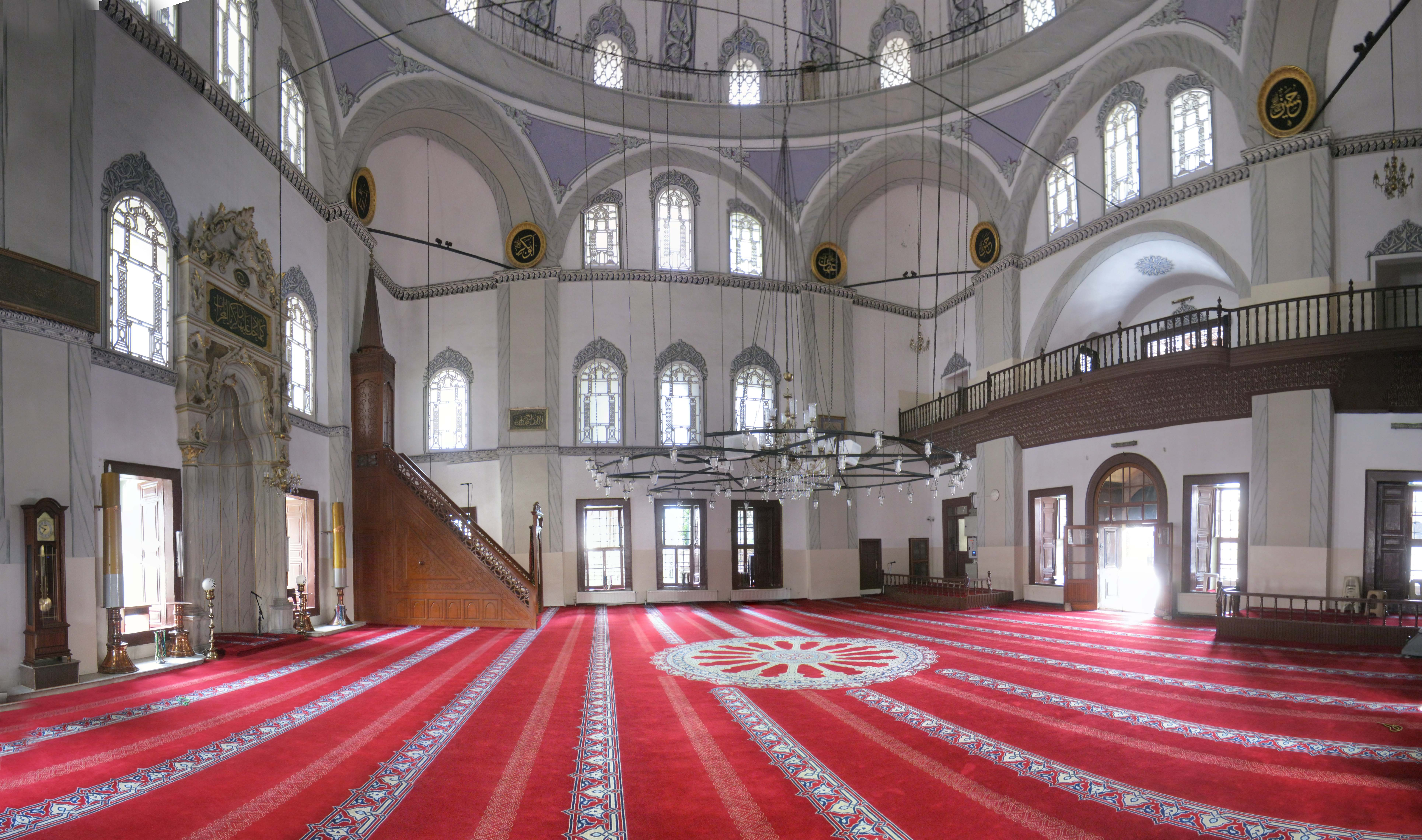 EMİRSULTAN CAMİİ mosque İÇİ .BURSA